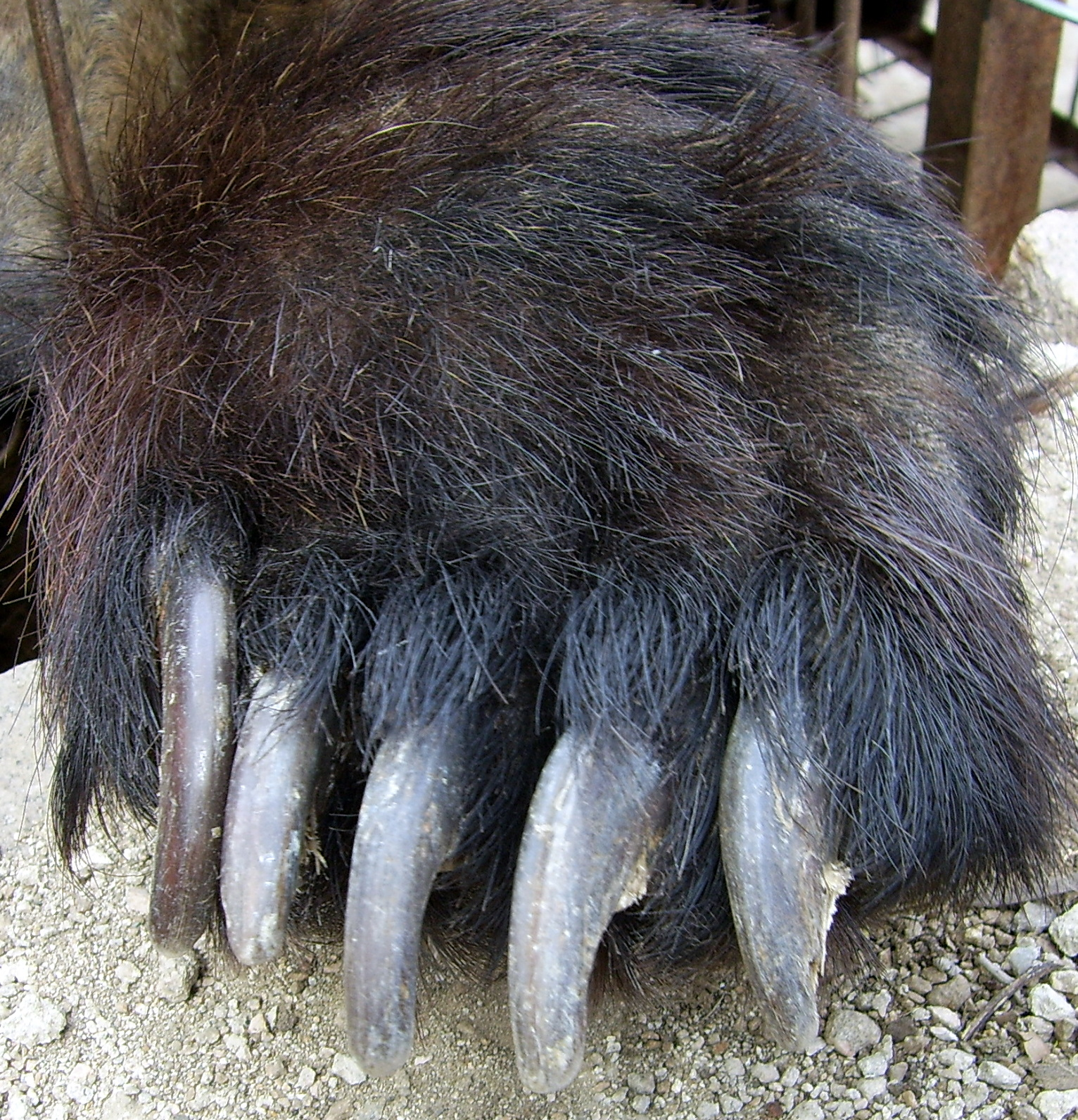 bear paw(熊掌)